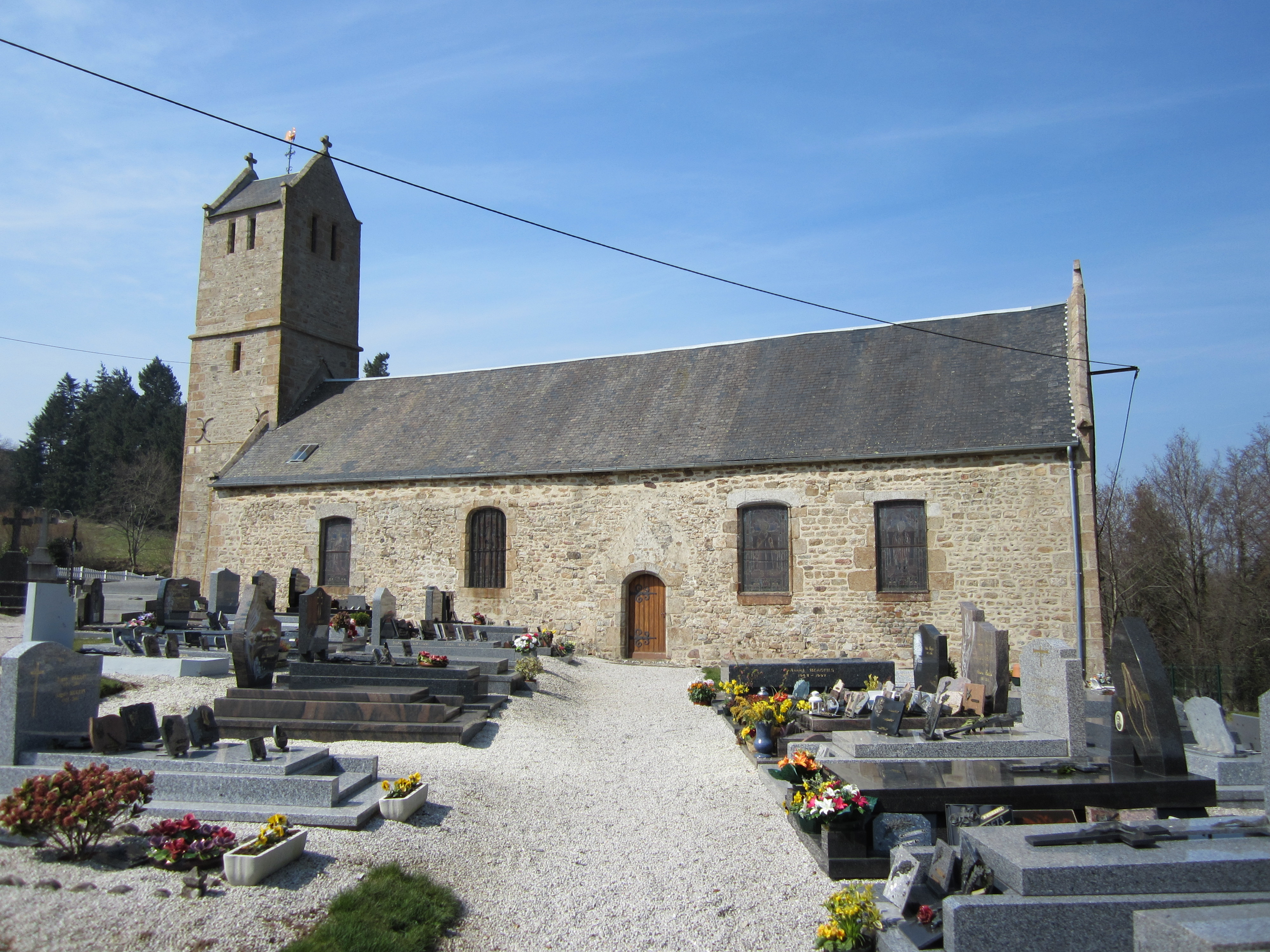 église Saint-Maur de Saint-Maur-des-Bois